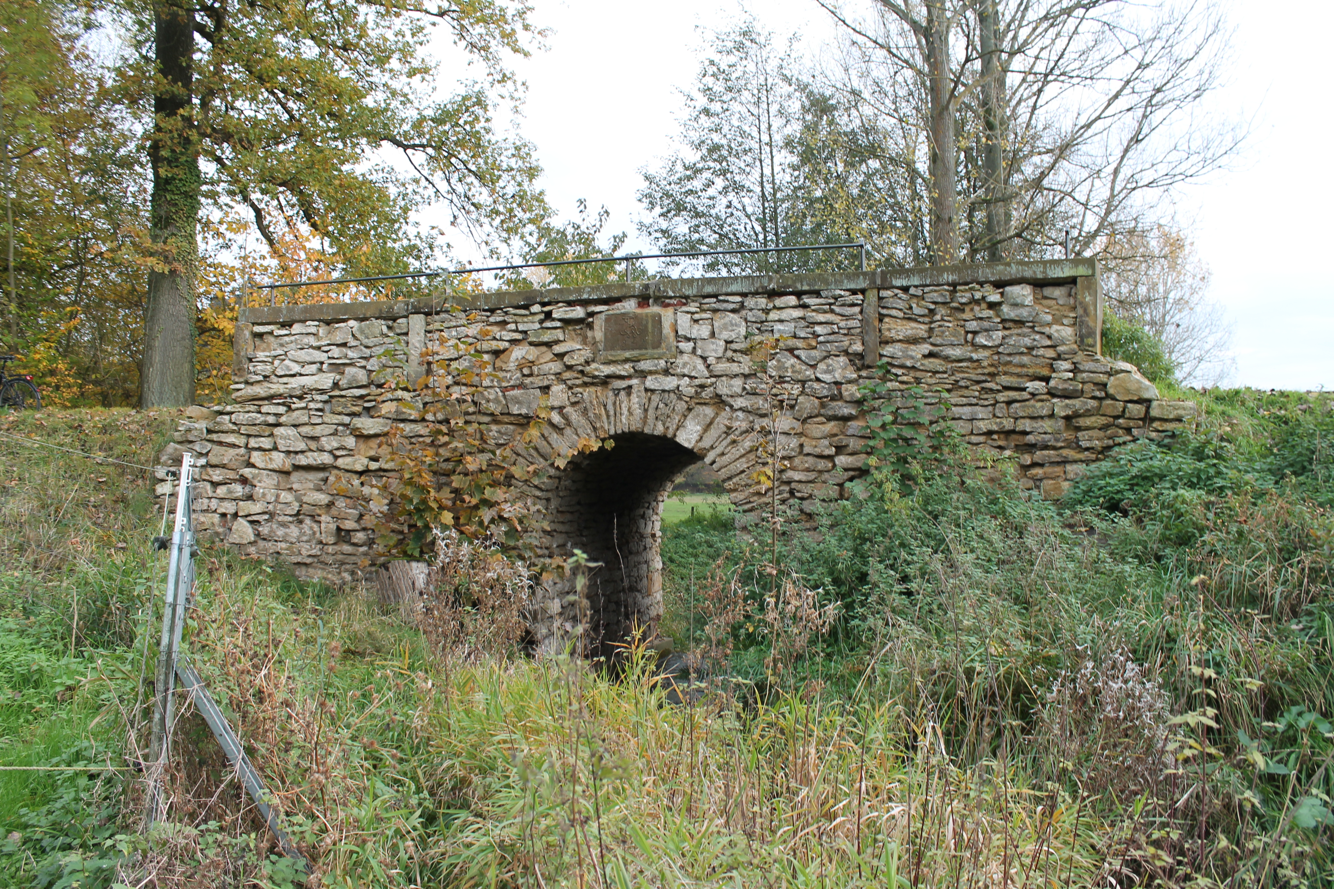 Bielefeld, Baudenkmal 219